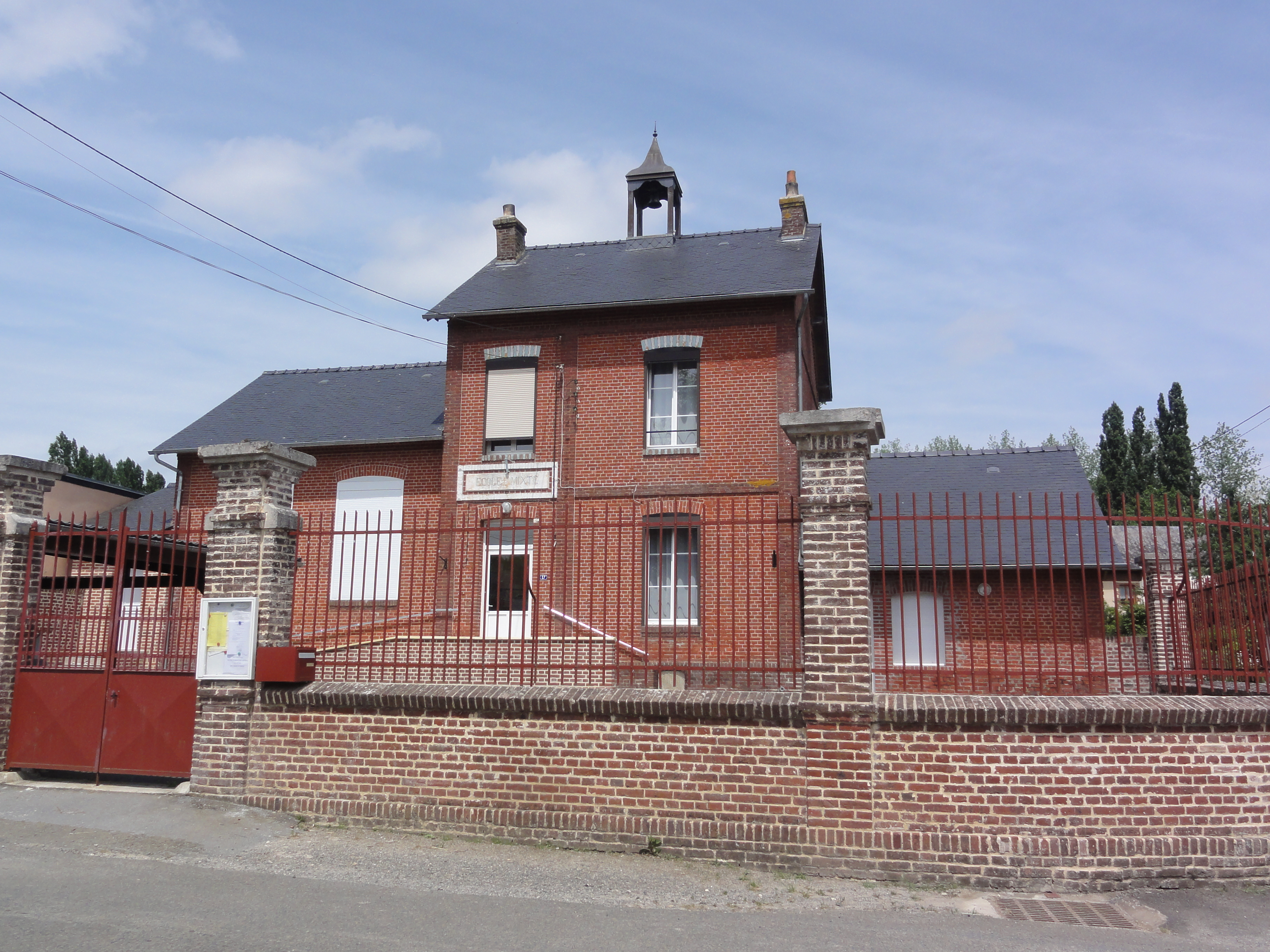 Sainte-Geneviève (Aisne) mairie, école mixte